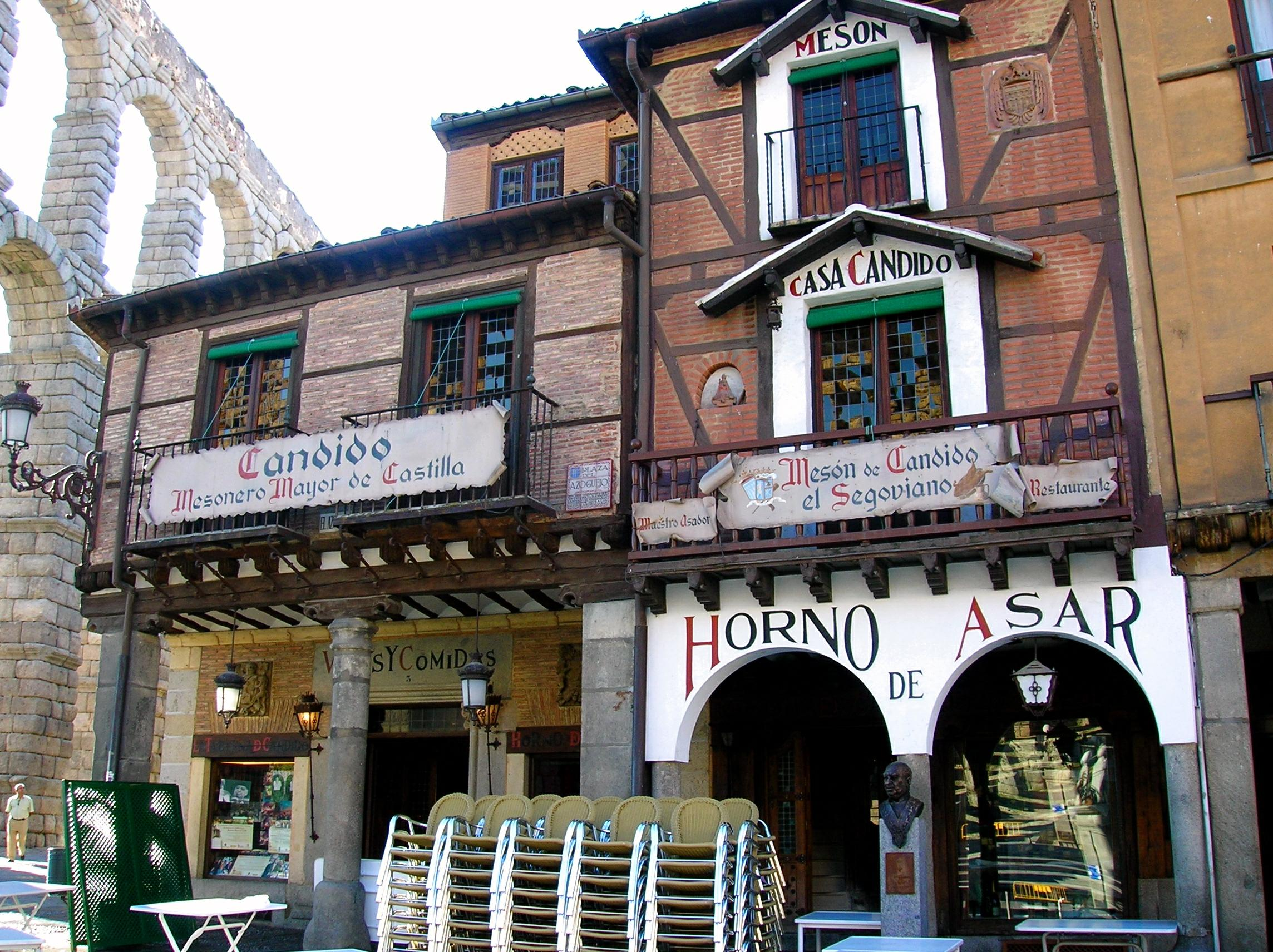 Mesón de Cándido, Segovia (Castilla y León, España).